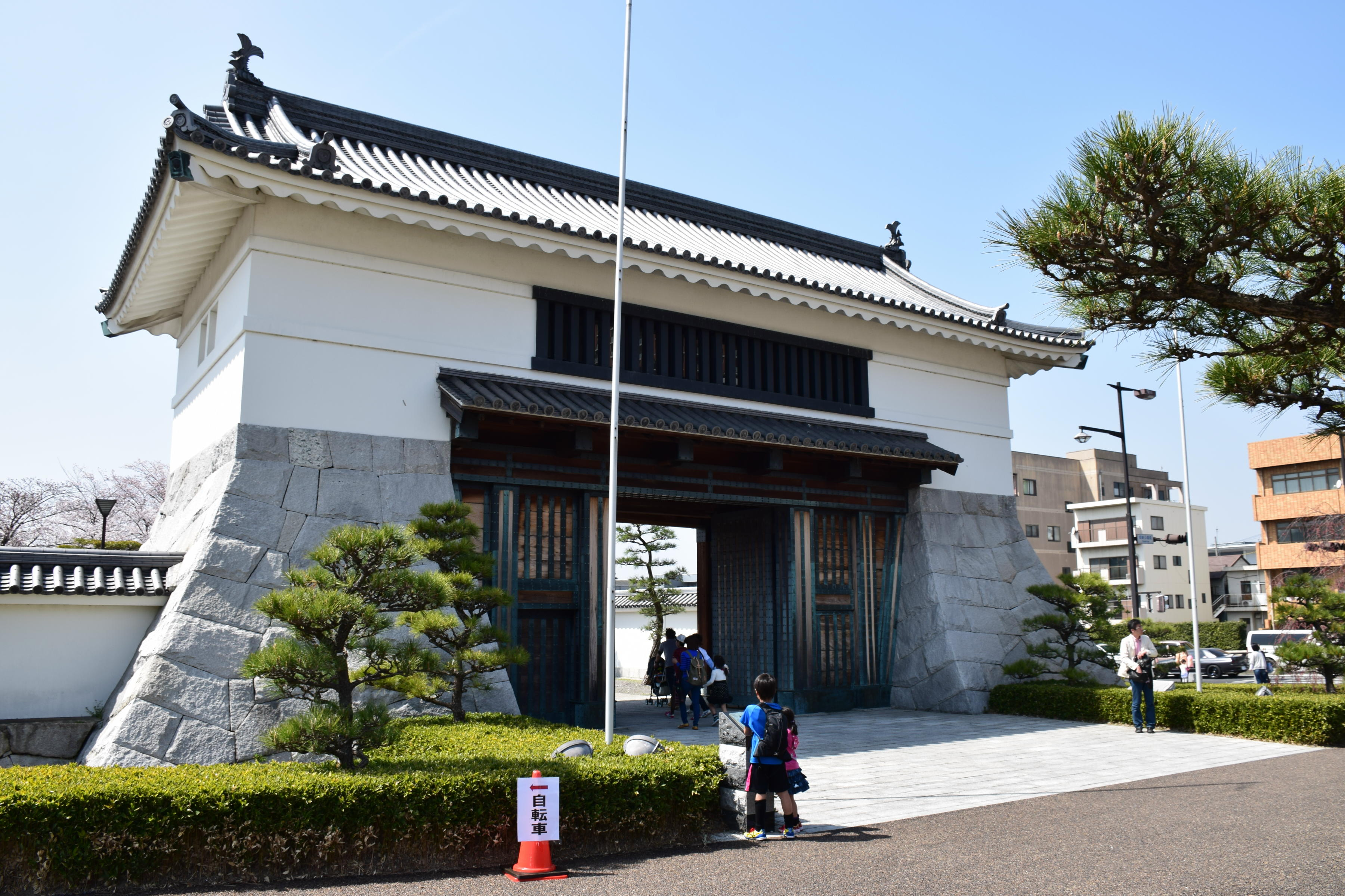 岡崎城大手門